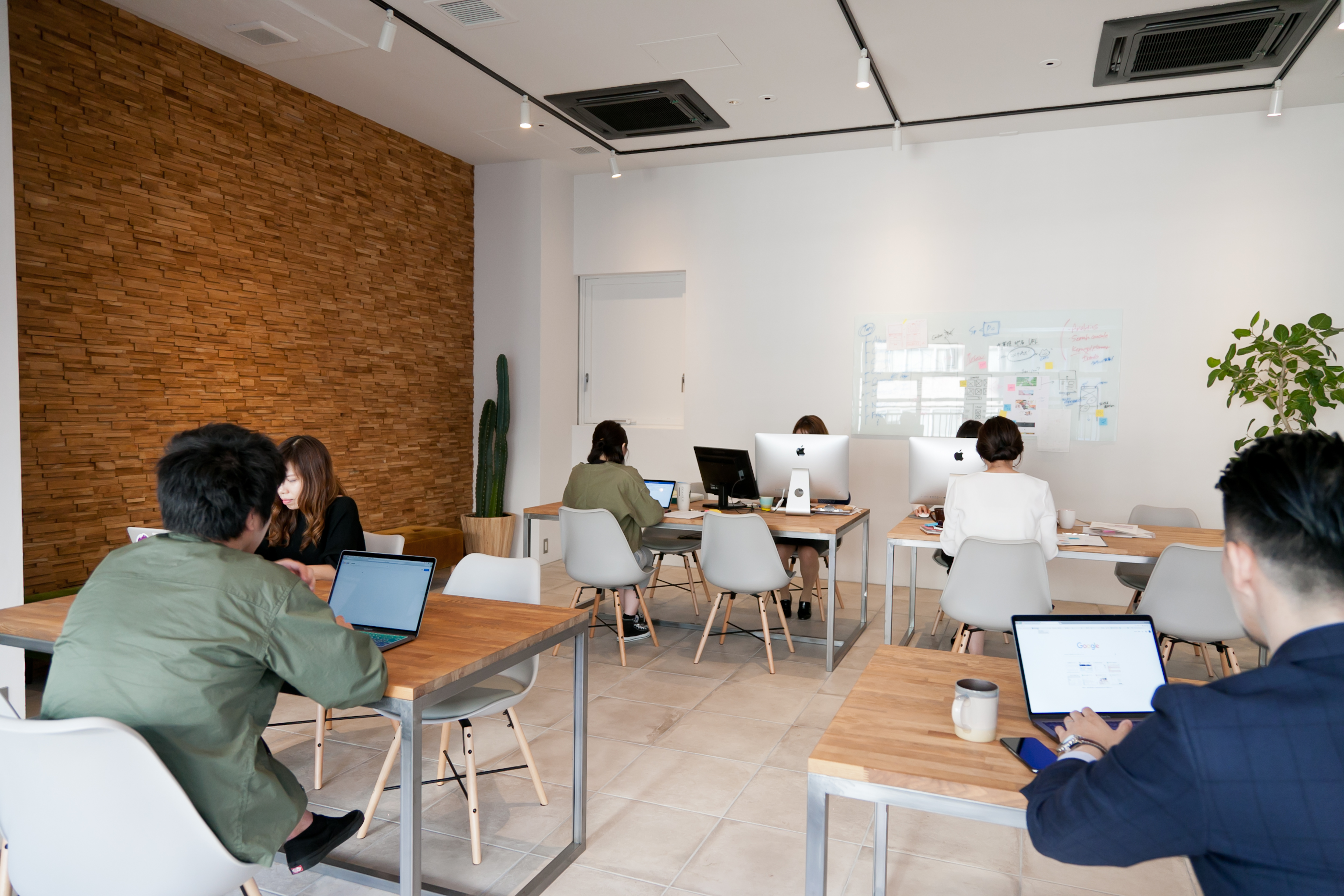 名古屋でホームページ（Webサイト）制作を行う株式会社オンカのオフィス写真です。